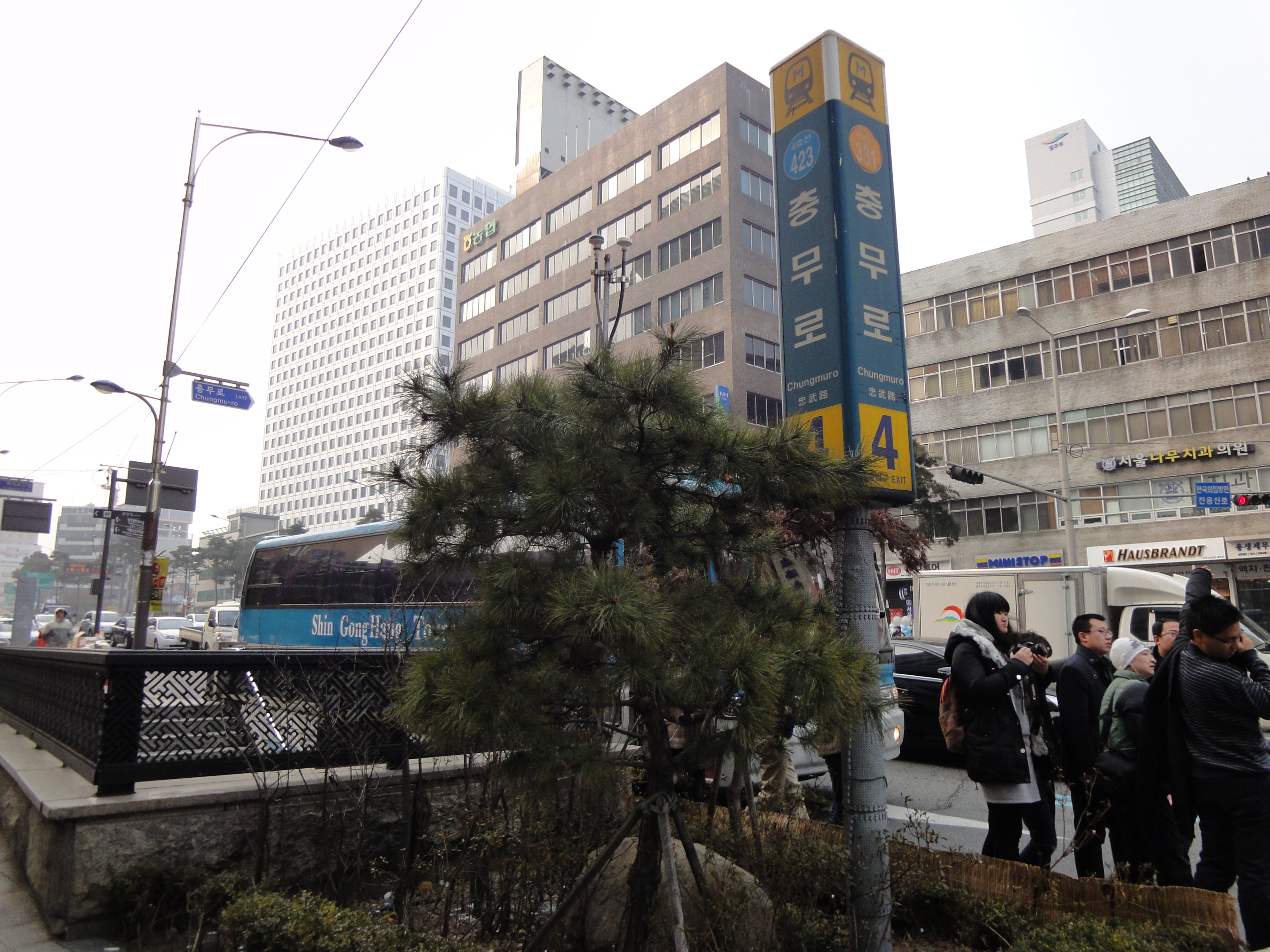 서울 지하철 3호선과 4호선의 환승역인 충무로 역의 4번 출구의 모습